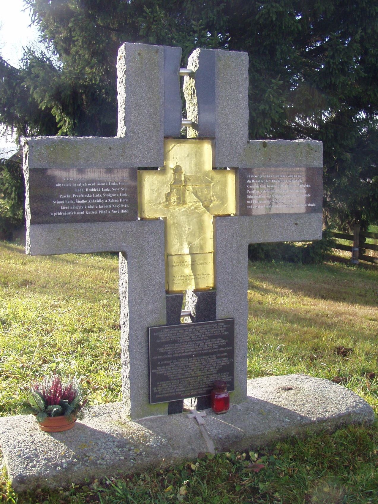 Kostel sv. Martina (Nový Svět)